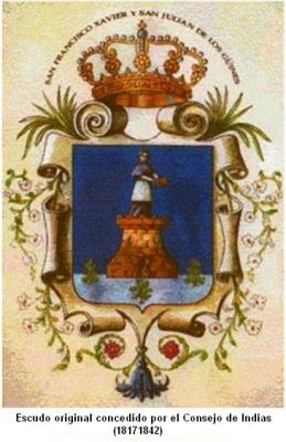 Escudo del municipio de Güines, Provincia de Mayabeque, Cuba